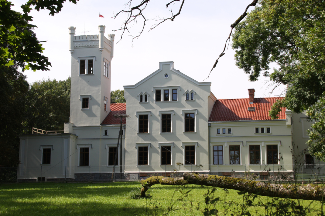 Gutshaus Jäglack 2017